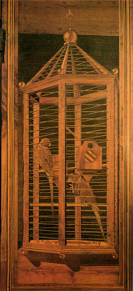 Studiolo, Mosaic woodwork Urbino, Palazzo Ducale